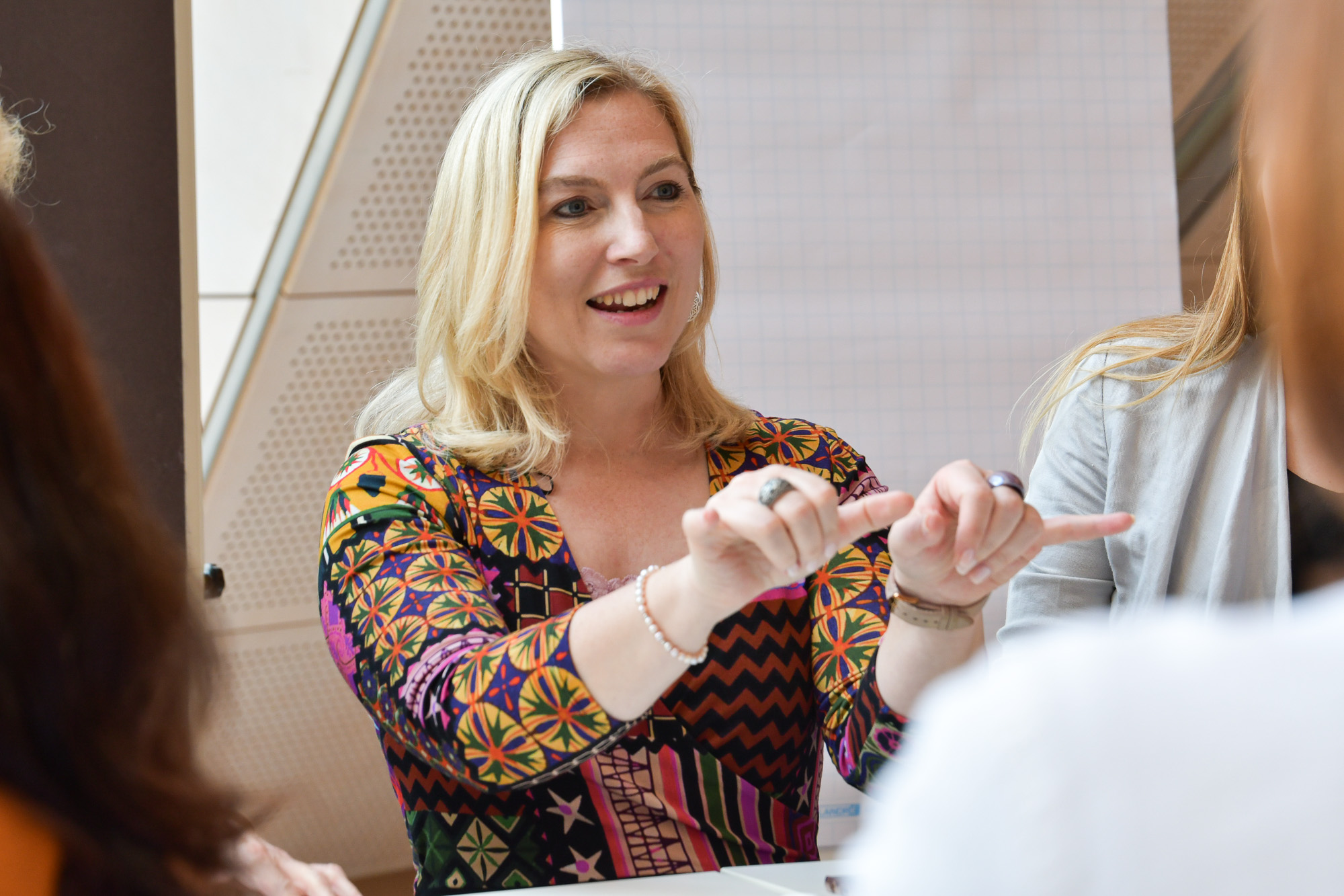 Kindern Wege öffnen. Das Recht auf Bildung von Anfang an.